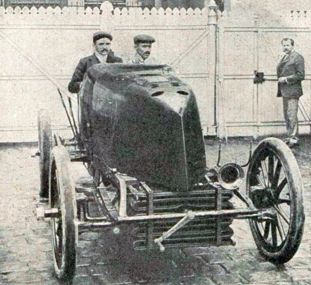 Fernand Gabriel, avant Paris-Madrid 1903 (sur Mors) - La Vie au Grand Air du 14 janvier 1904, p.31